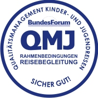 Siegel für zertifizierte Reiseorganisationen.